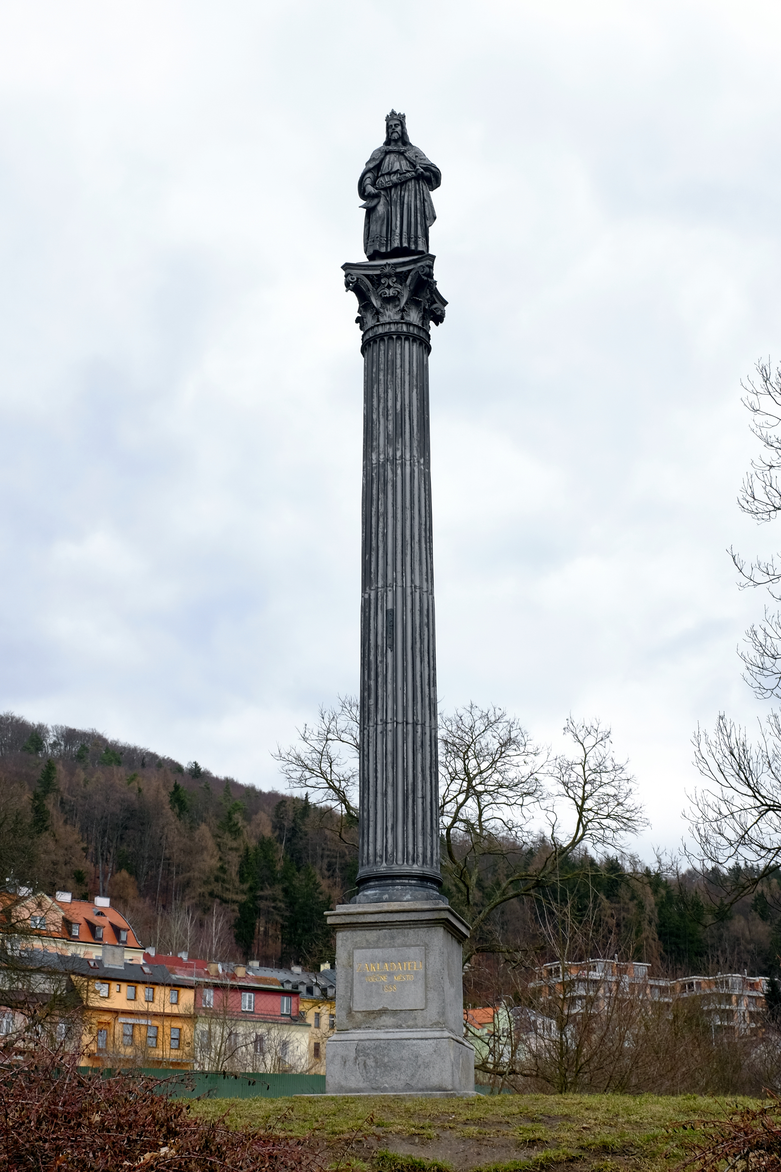 Socha Karla IV., v parku na stezce Jeana de Carro, parc. 1297/1, Karlovy Vary.